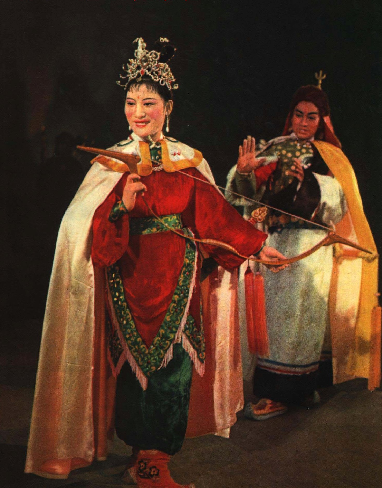 1962-06 1962年 话剧 文成公主